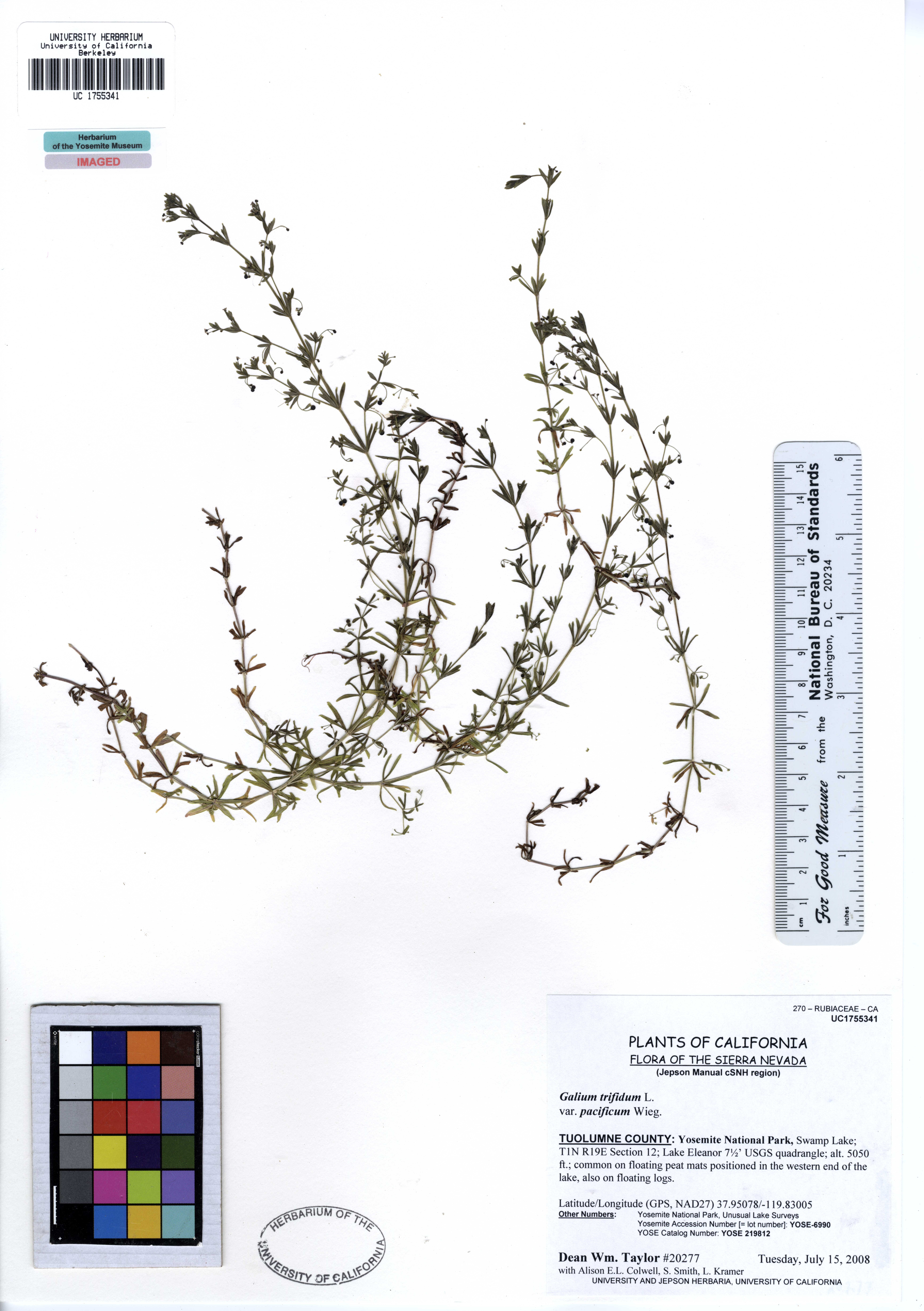 UC1755341 Galium trifidum var. pacificum